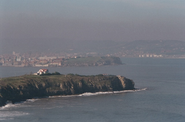 Senda del Cervigón, un paseo por la costa de Gijón.